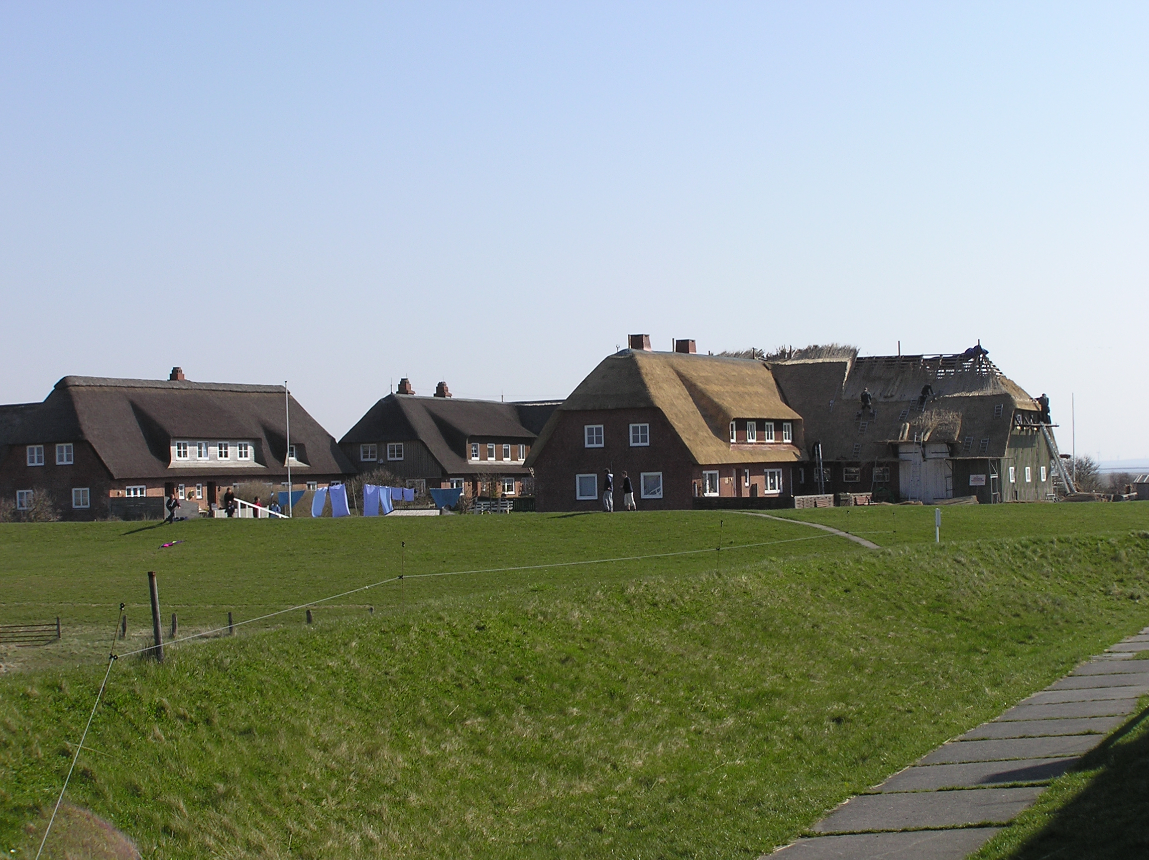 Hallig Groede, Knudtswarft von der Kirchwarft aus gesehen